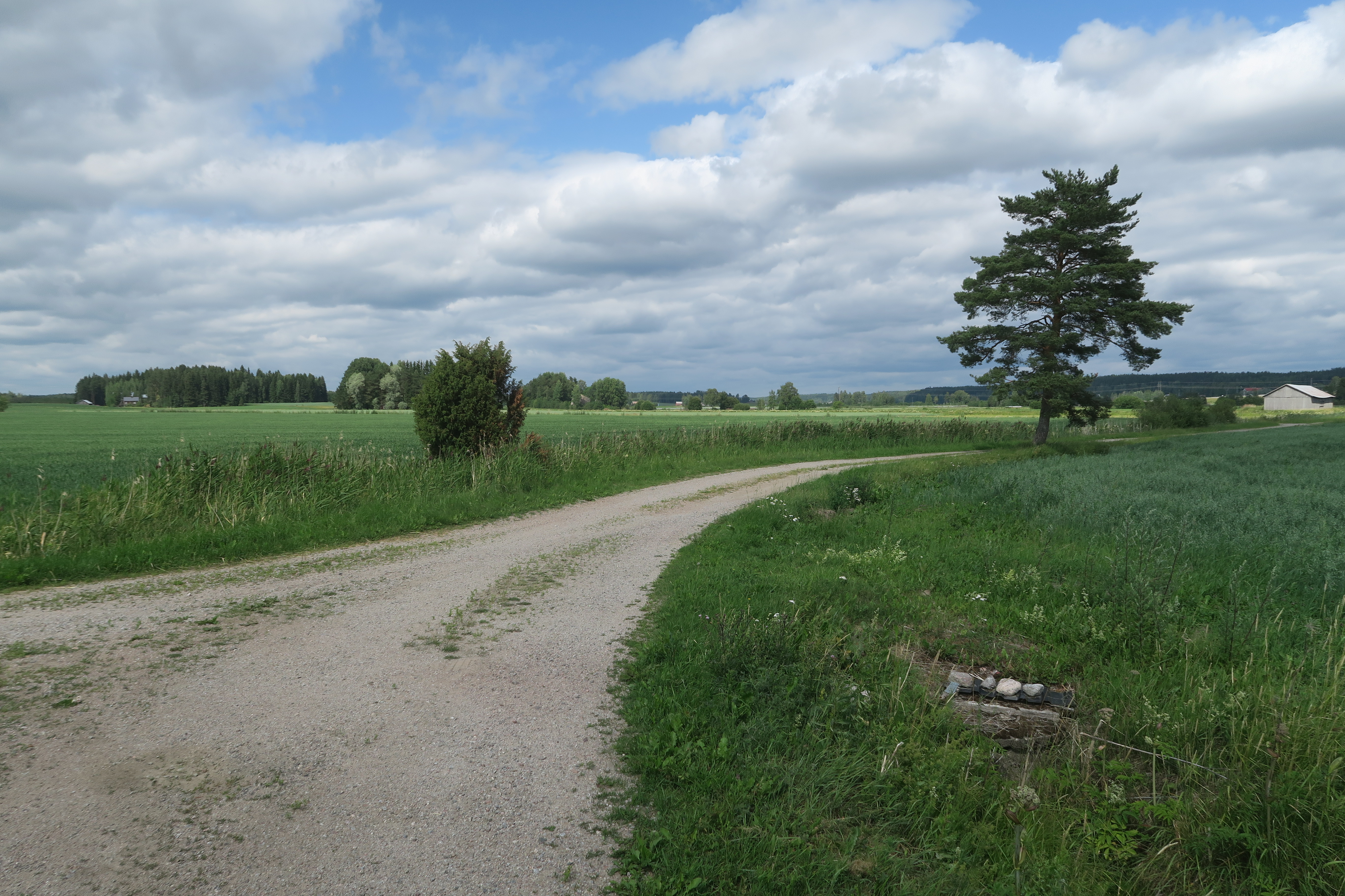 Aneriojärven luonto- ja kulttuuripolkua Suomusjärvellä Salossa polun Hermolanvahan rajakivelle vievällä osuudella Lahden peltoaukealla heinäkuussa 2018.